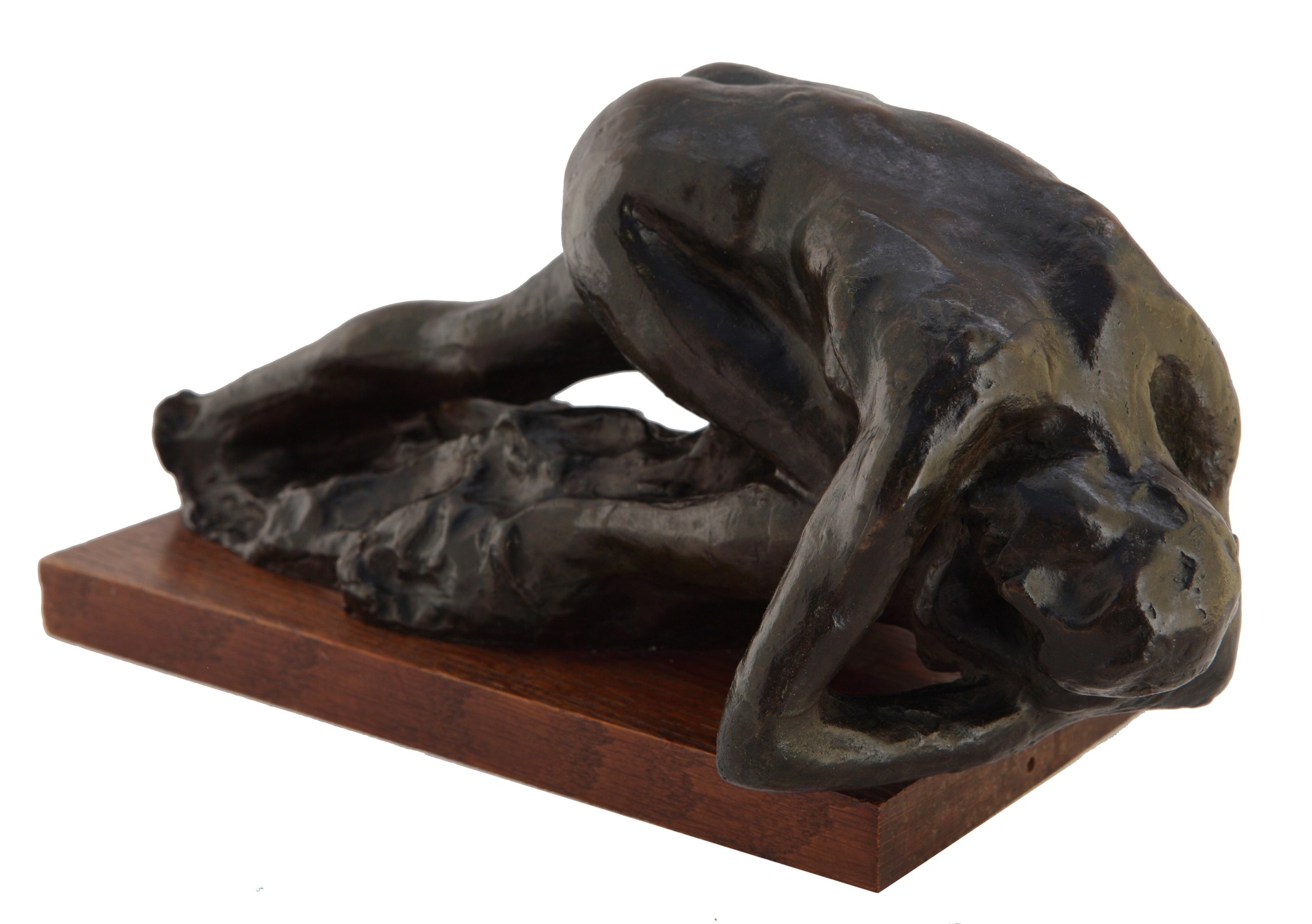 Auguste Rodin, Estudio para la Danaide. Ca. 1887. 34 x 14 x 14,2 cm, bronce patinado . Inv. 7770.